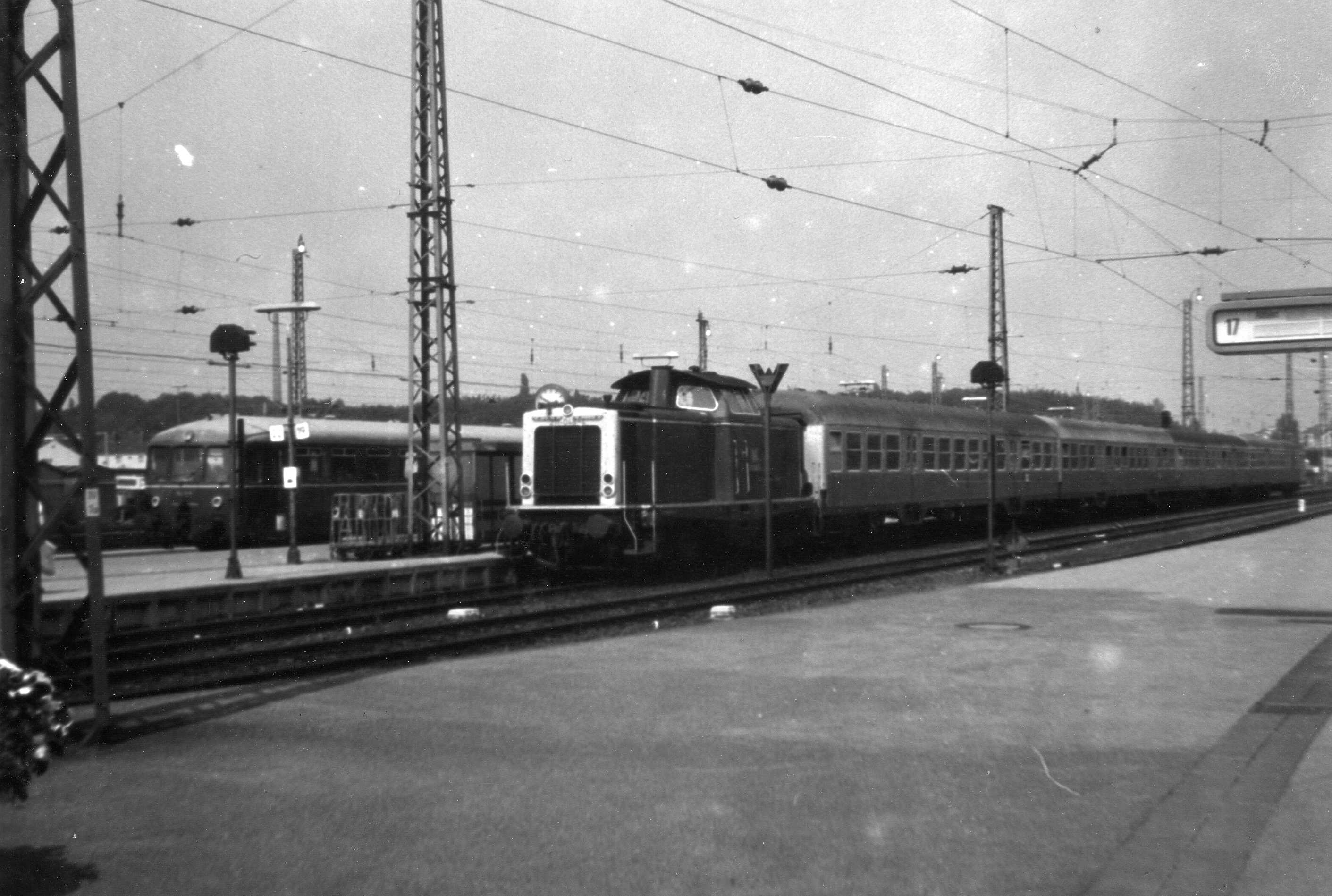 Auf Gleis 19 ist eine Diesellok der Baureihe 211 mit dem aus "Silberlingen" gebildeten Zug N 8124 von Neuss eingefahren (planmäßige Ankunft: 14.46 Uhr), der bald (14.58 Uhr) als N 8125 nach Düsseldorf zurückfahren wird. Links rollt gerade ein Akkutriebwagen der Baureihe 515 als Nt 8072 von Jülich auf Gleis 22 ein (planmäßige Ankunft: 14.48 Uhr).